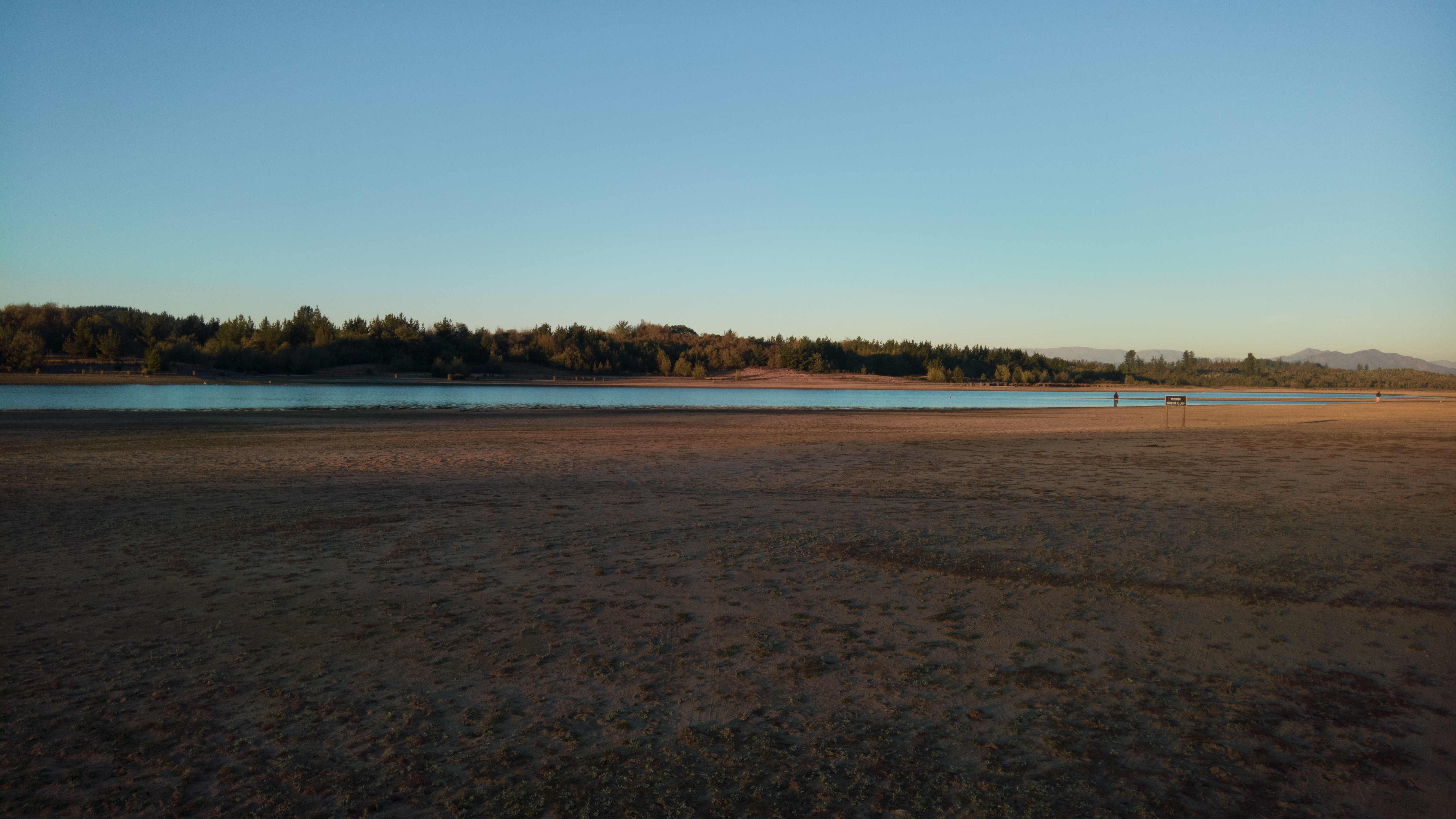 Reserva nacional Lago Peñuelas (región de Valparaíso, Chile), durante la megasequía 2010-2019. Vista parcial del embalse.